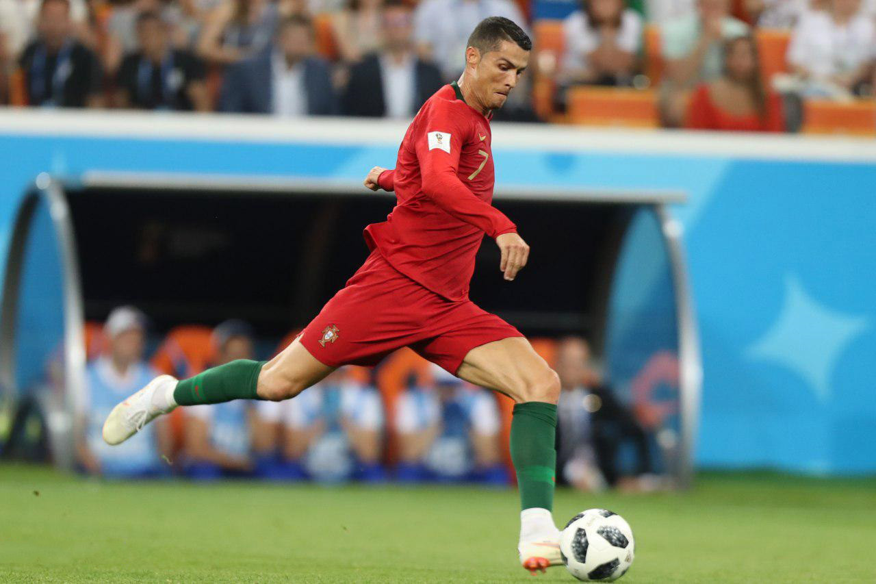 نیمه دوم بازی تیم‌های فوتبال ایران و پرتغال در جام جهانی ۲۰۱۸